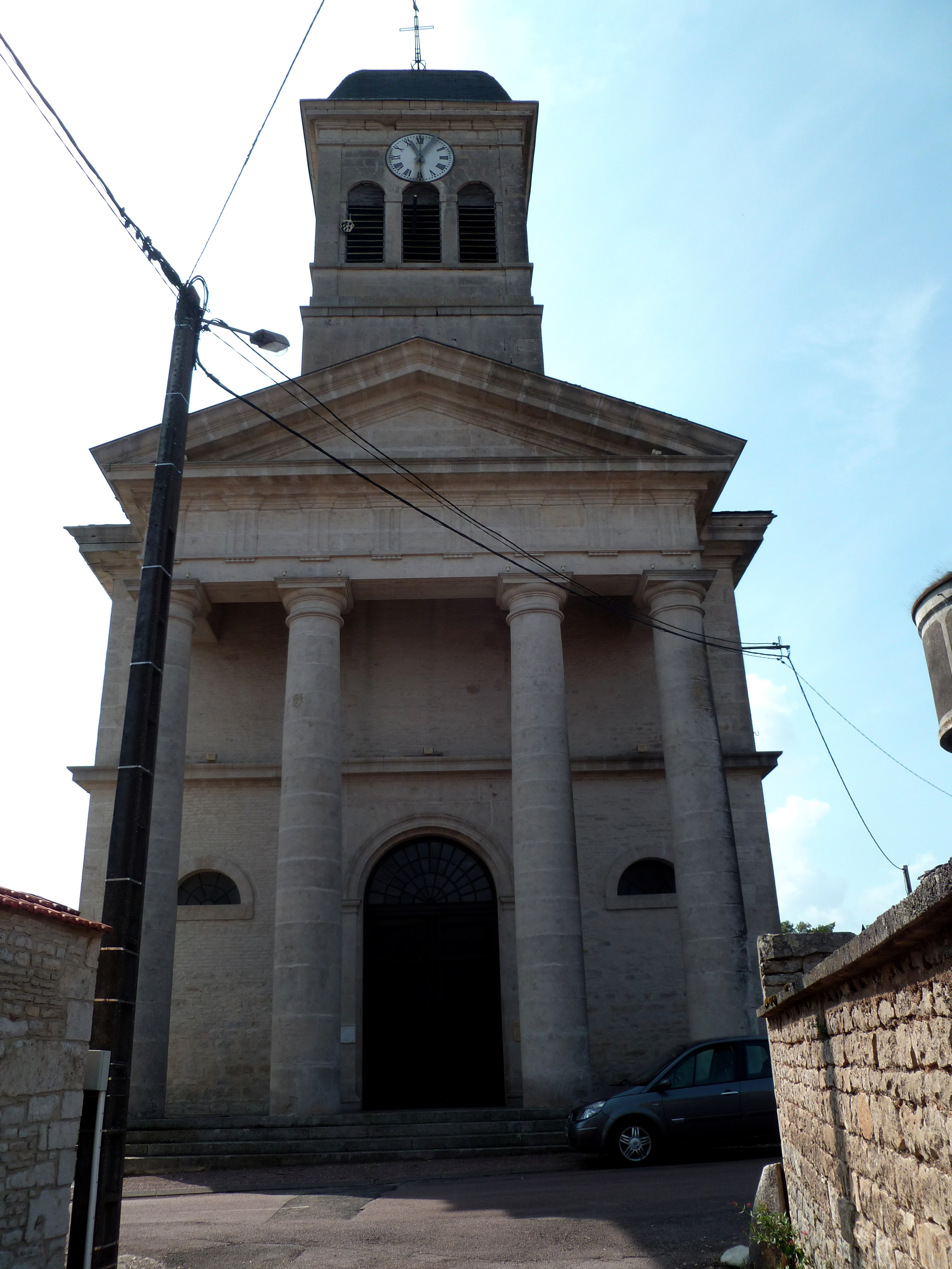 Ampilly-le-Sec (Côte-d'Or, France) église du village.